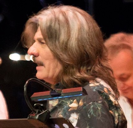 Carlos Alberto "Machi" Rufino. 21 de noviembre de 2015, en La Ballena Azul, Centro Cultural Néstor Kirchner, Buenos Aires en el homenaje “Spinetta: Tu vuelo al fin”.